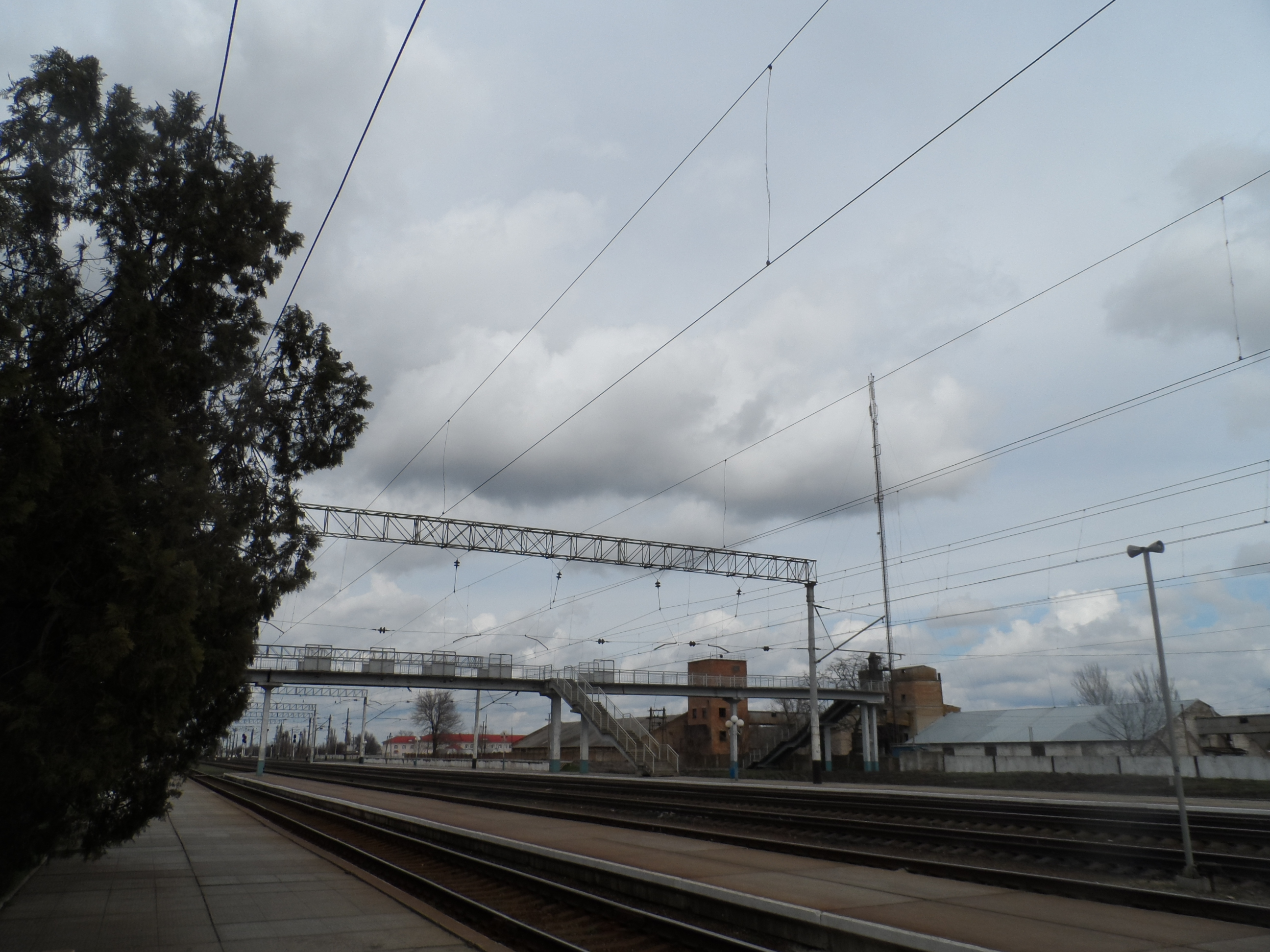 вокзал